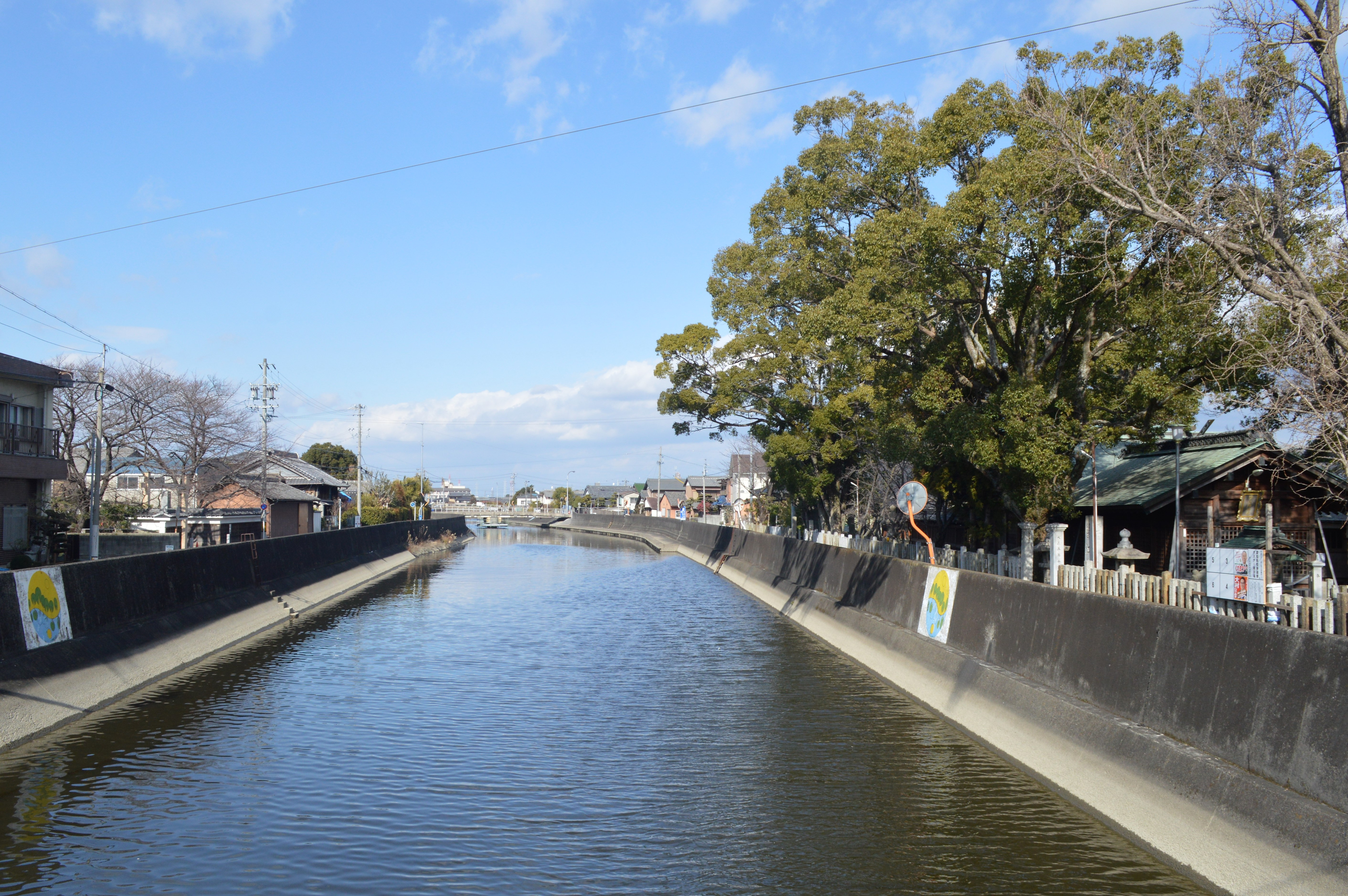 愛知県海部郡蟹江町を流れる蟹江川。右は蟹江神明社。